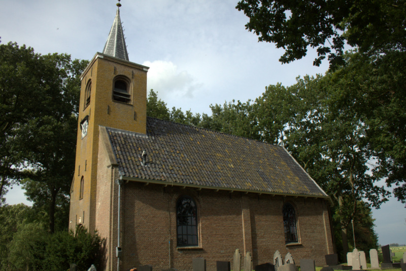 Het kerkje in Augsbuurt heet tegenwoordig de Muziekkapel